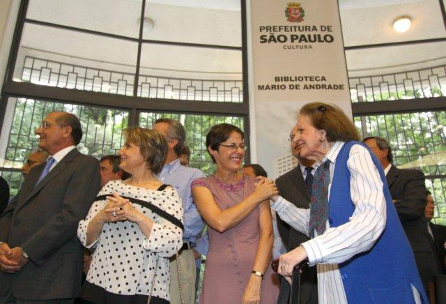 A ministra da Cultura, Ana de Hollanda, prestigiou a cerimônia de reabertura da Biblioteca Municipal de São Paulo – Mário de Andrade, evento que fez parte das comemorações do aniversário de 457 anos do município. Foto: Marcos Fioravanti